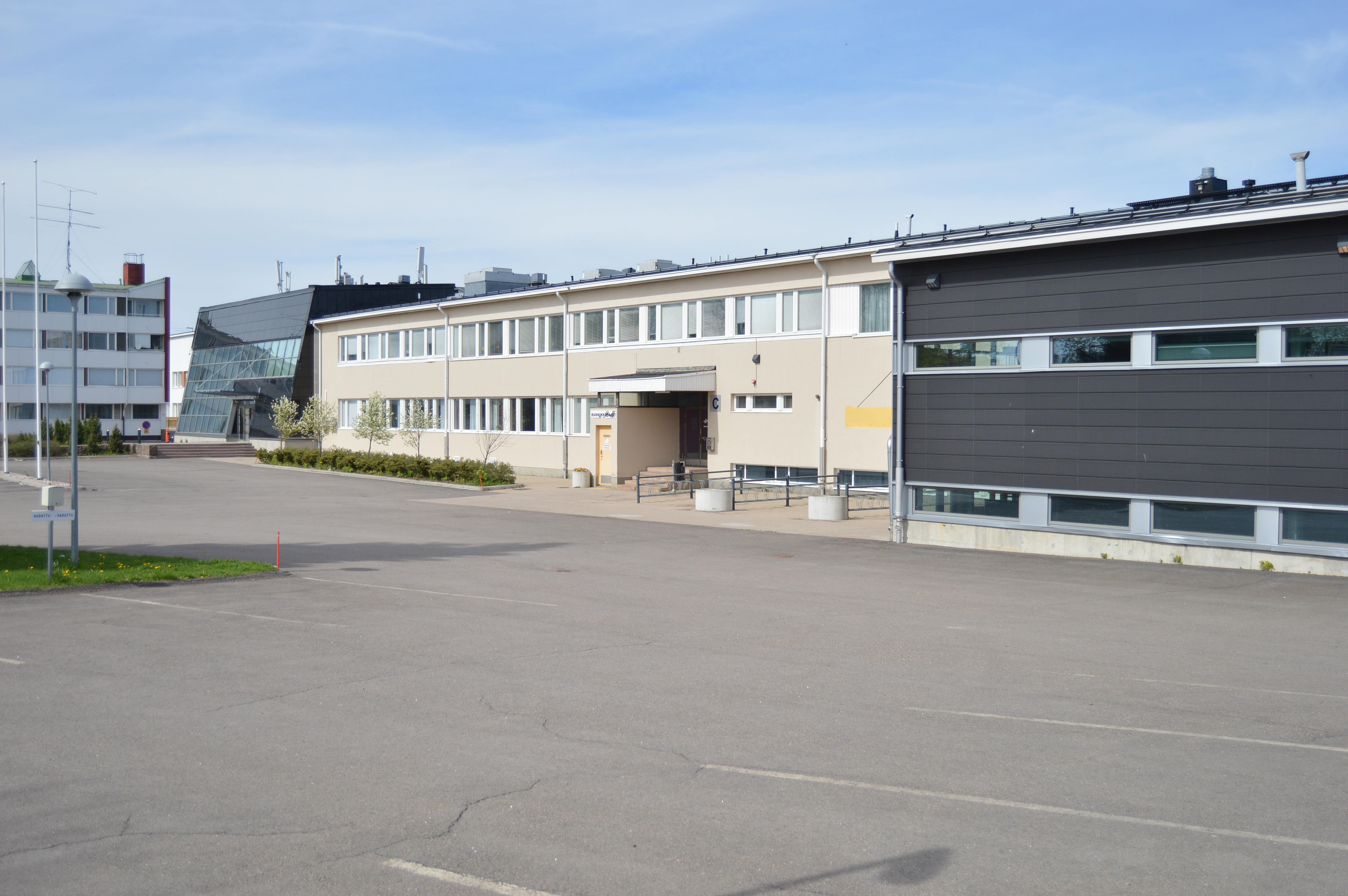 Etelä-Kymenlaakson ammattiopiston (Ekami) Haminan kampus